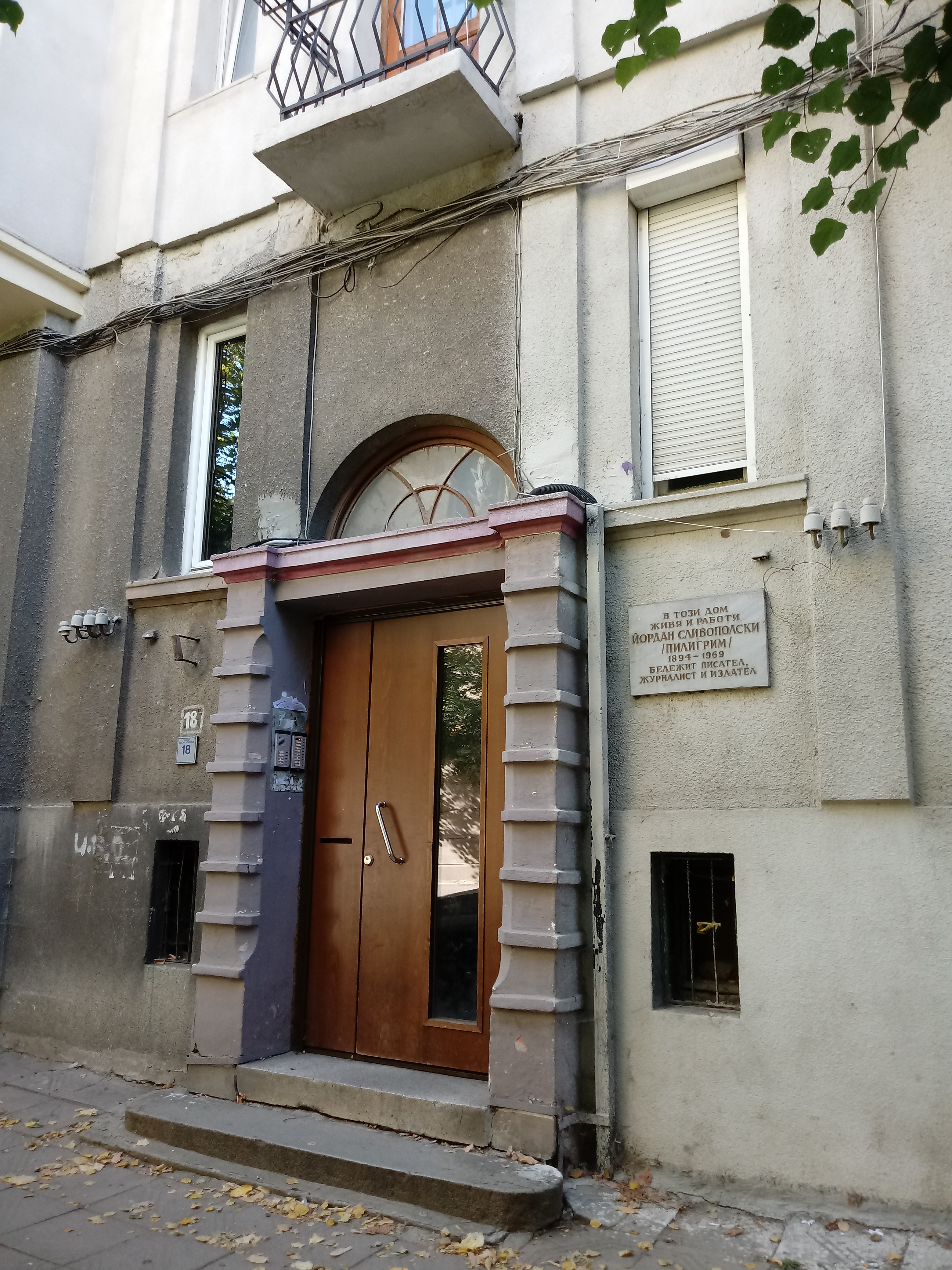 Домът с паметна плоча на писателя Йордан Сливополски - Пилигрим на ул. "Васил Априлов" 18, София